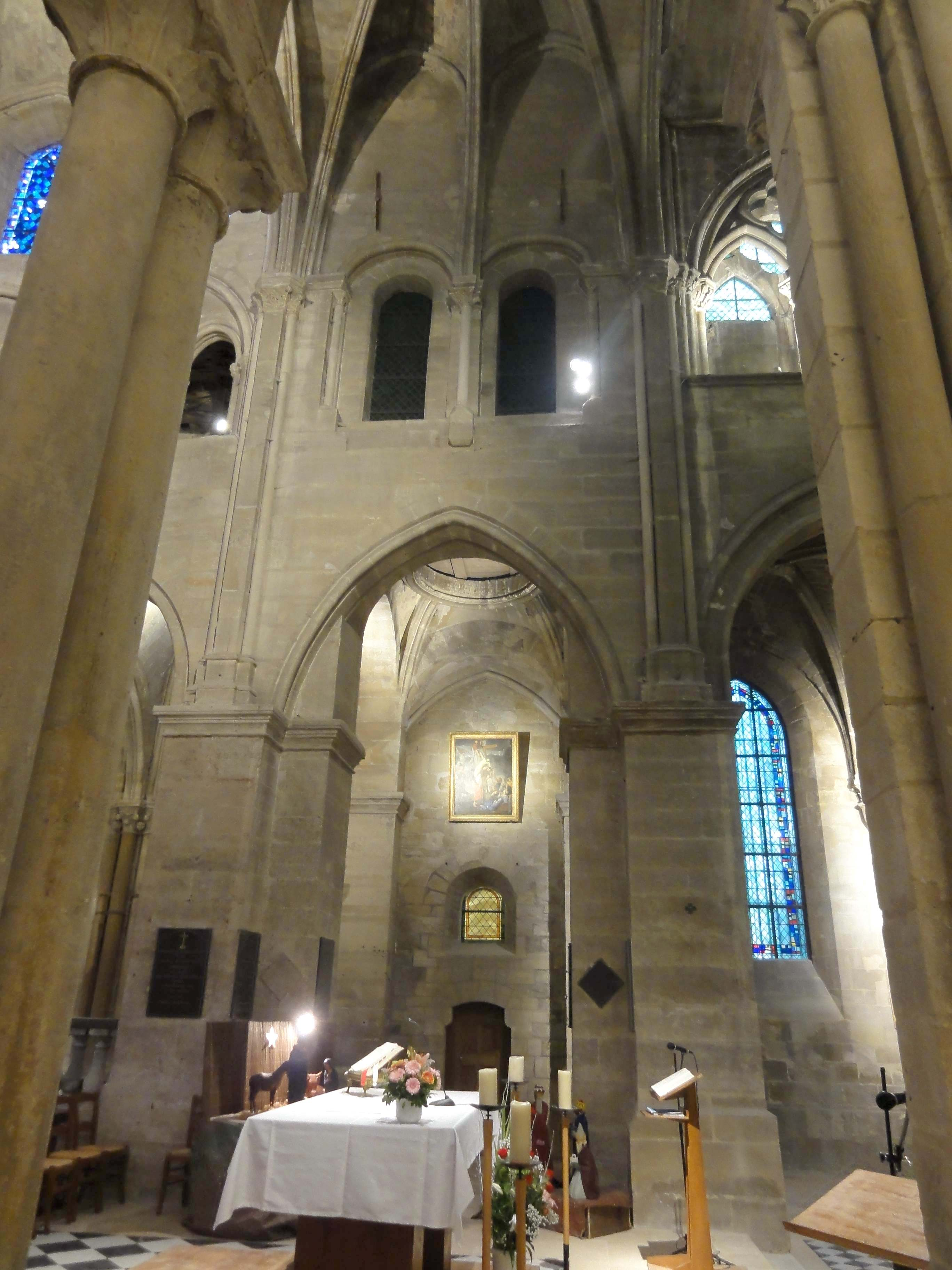 Intérieur de l'église - voir titre.